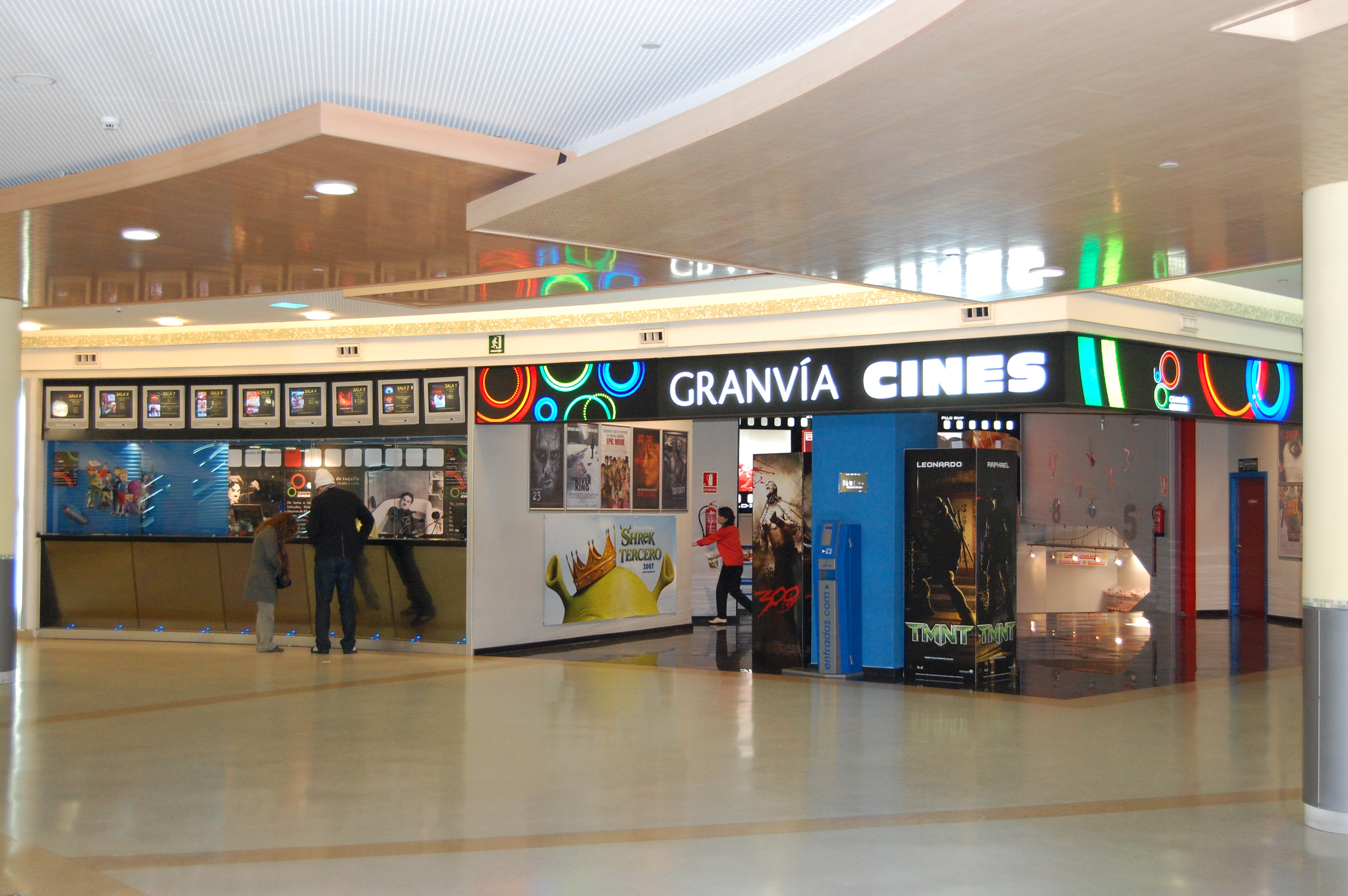 O complexto de salas de cinema do Centro Comercial Gran Vía de Vigo.